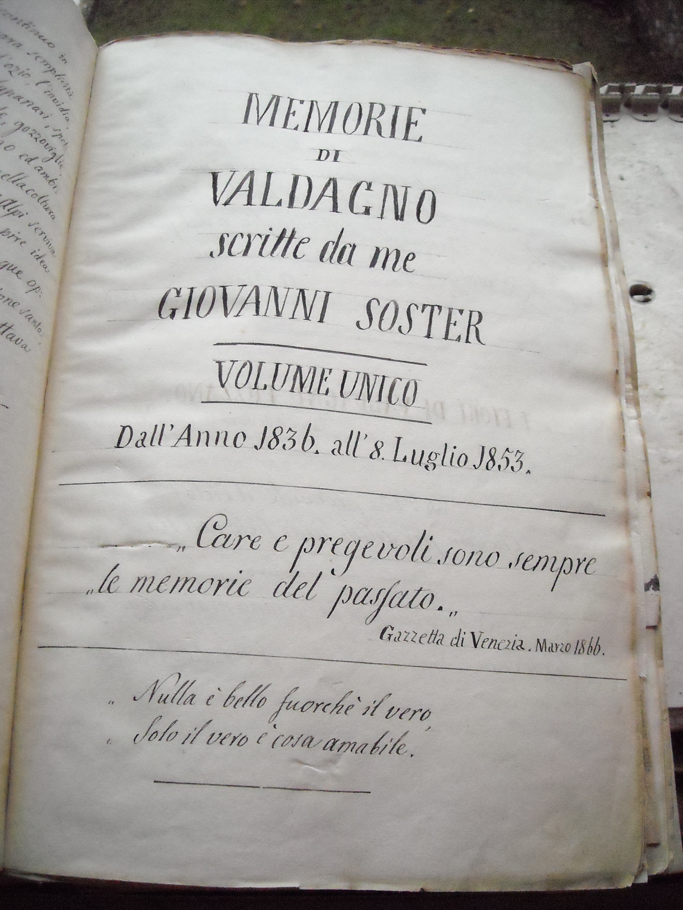 Memorie manoscritte del cronista storico Giovanni Soster riguardanti gli avvenimenti di Valdagno